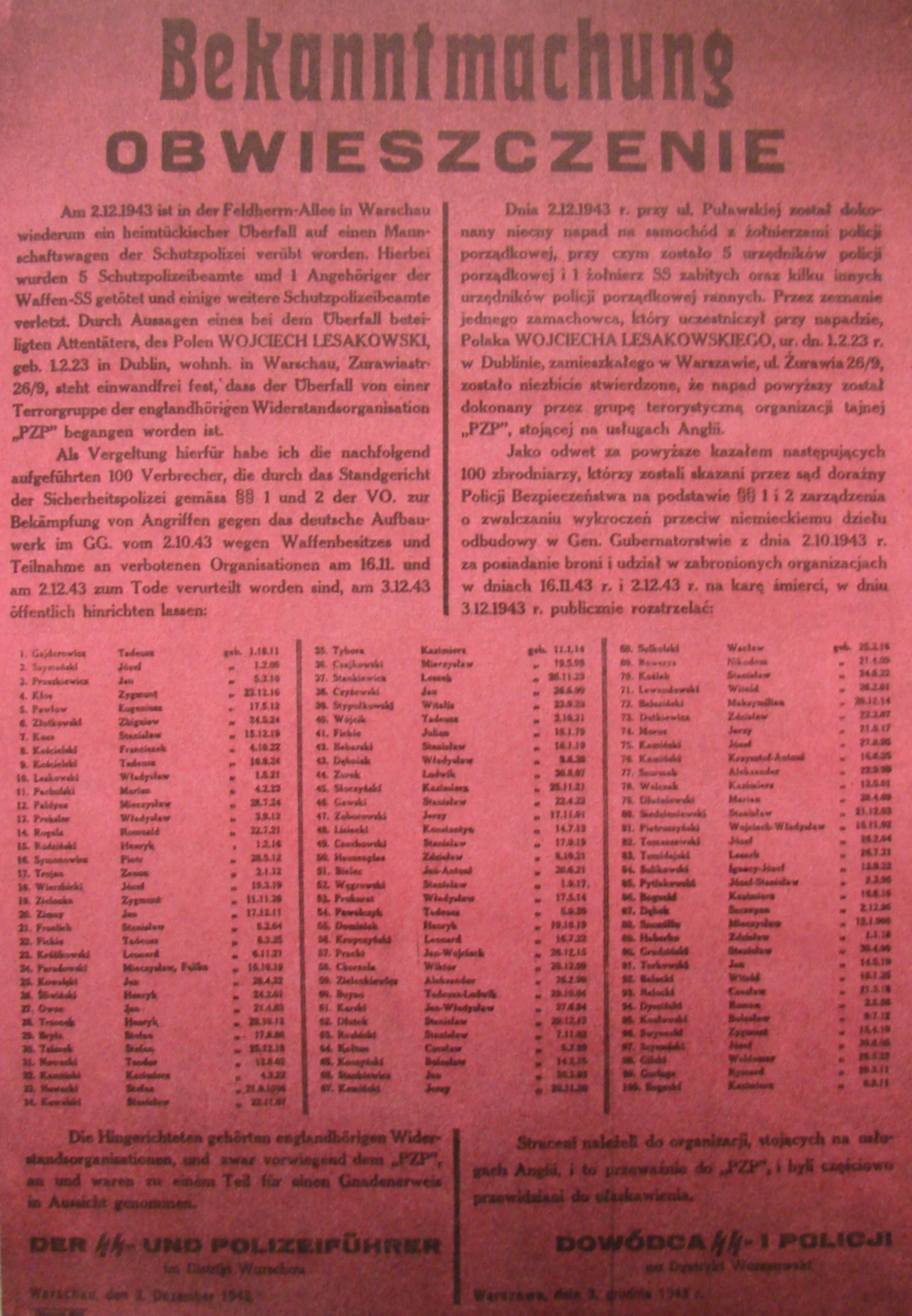 Bekanntmachung 2.12.1943 Warschau.